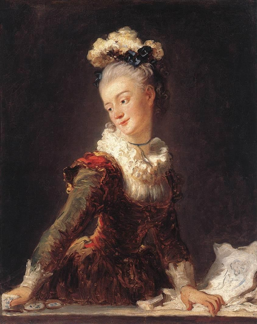 Portrait de Marie-Anne-Éléonore de Grave anciennement identifié comme celui de Marie-Madeleine Guimard.